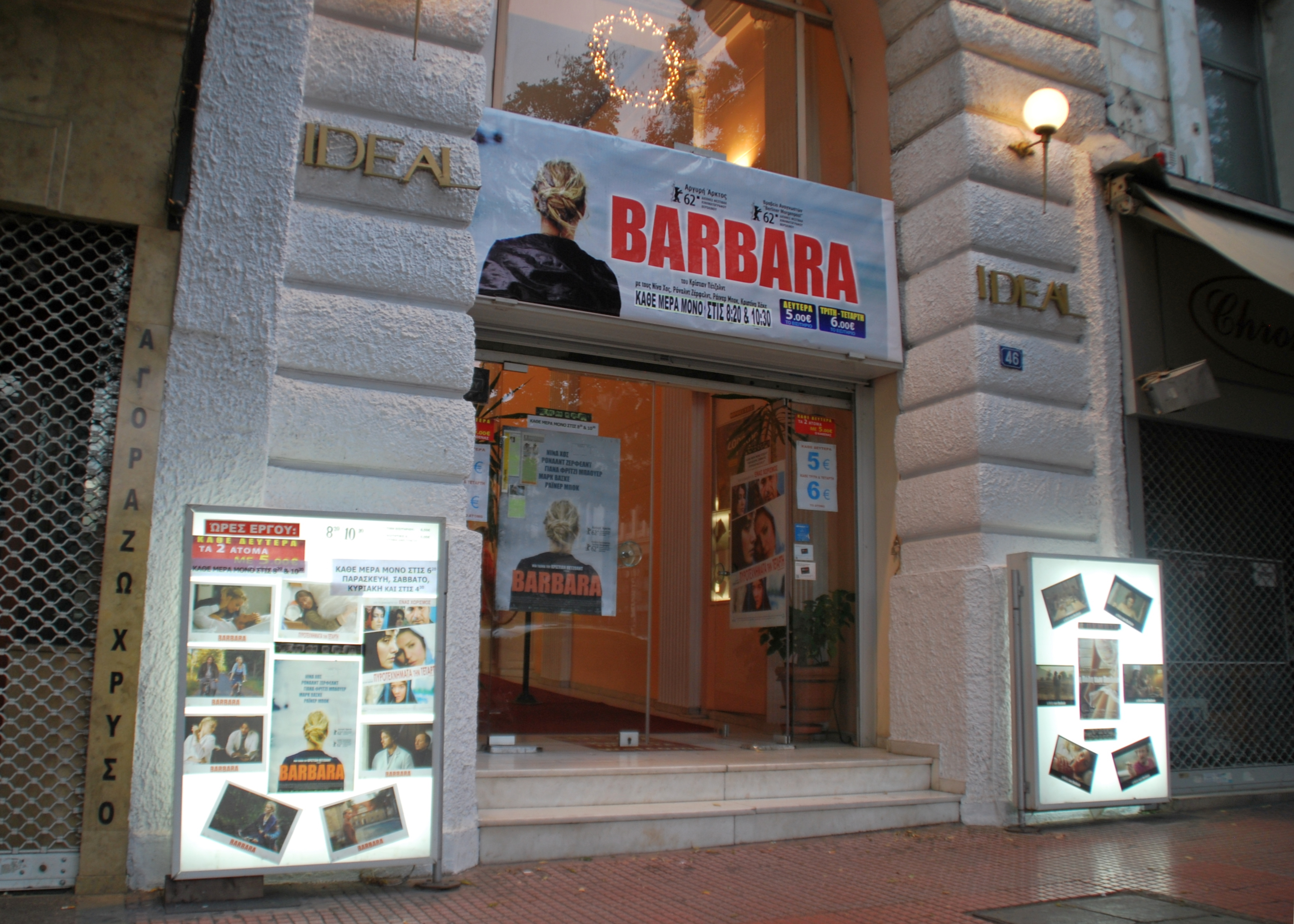 Kinowerbung in Athen, Odos Eleftheriou Venizelou: Barbara